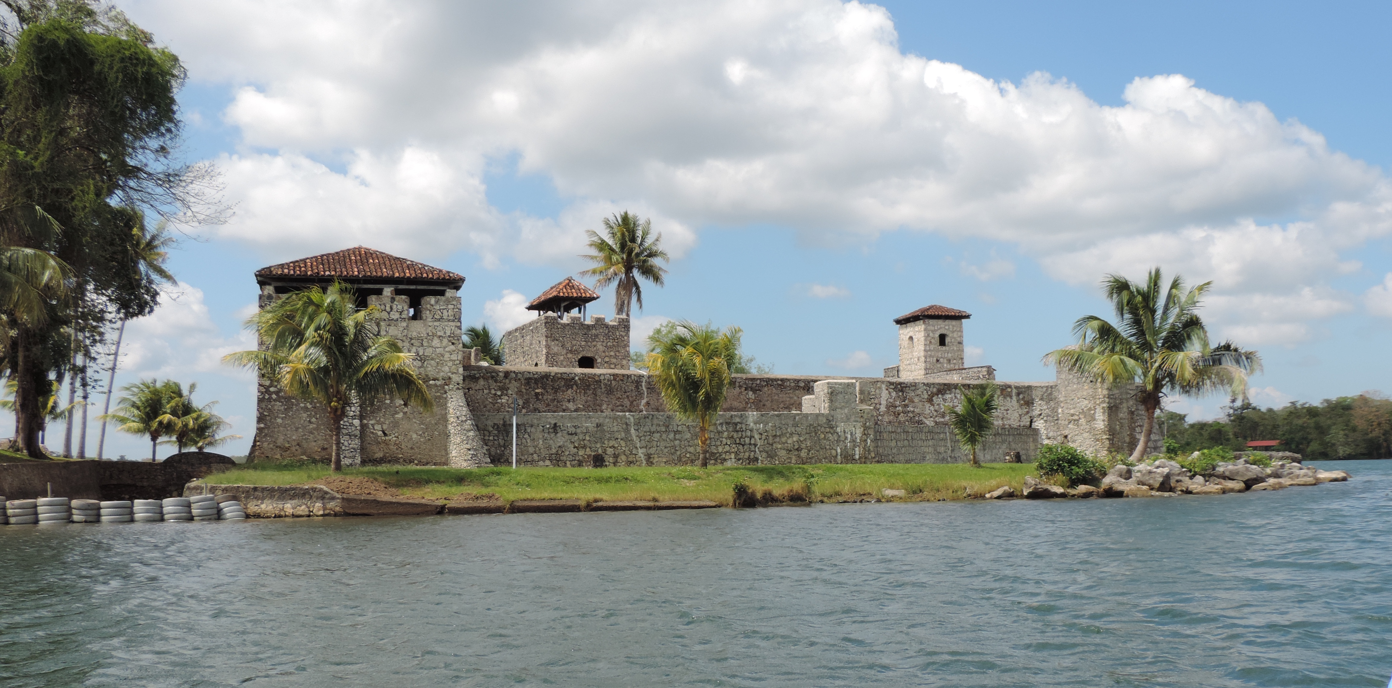 Castillo de San Felipe de Lara Río Dulce Izabal / Lago de Izabal